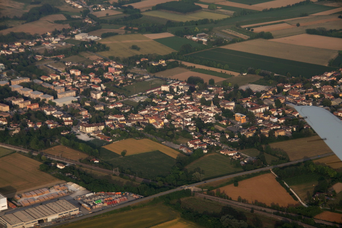 Vista aèria del la fracció de Peris, municipi de San Canzian d'Isonzo